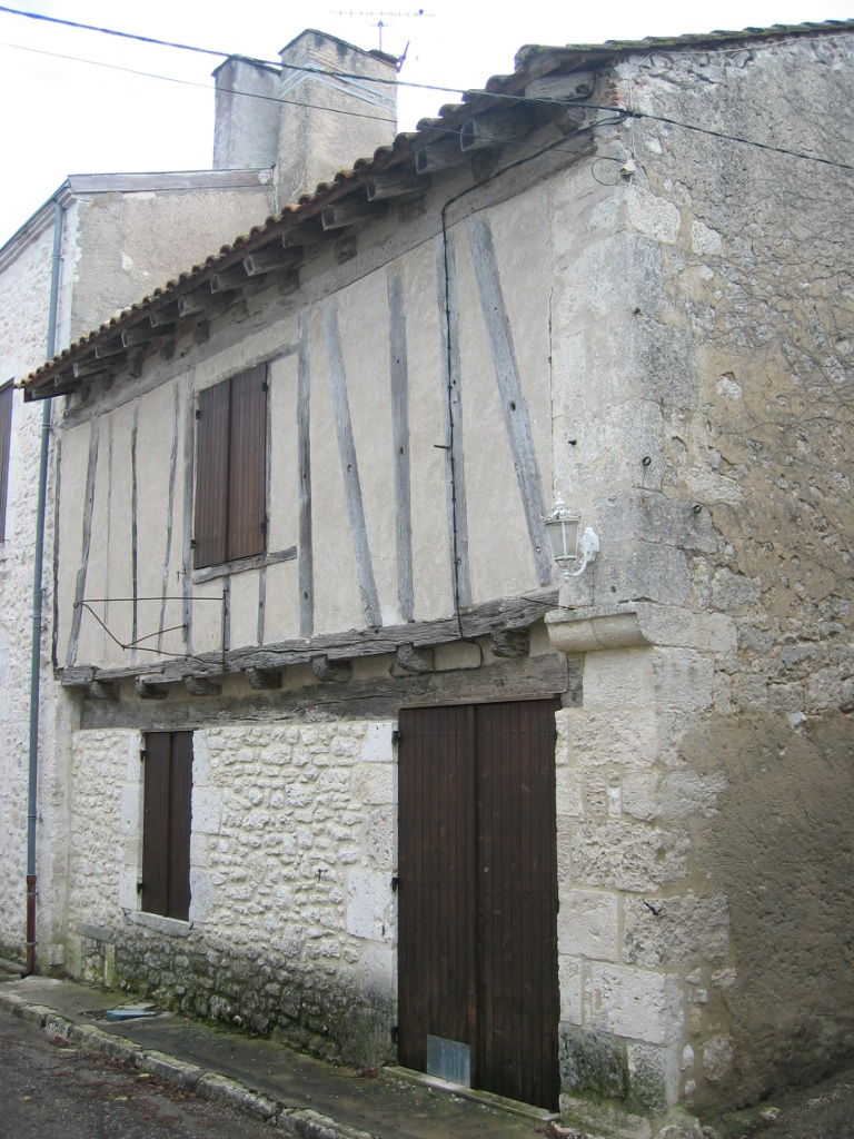 Maison du XVIe siècle dans le bourg de Soumensac Lot-et-Garonne Prise de vue novembre 2006 Auteur : Jacques David